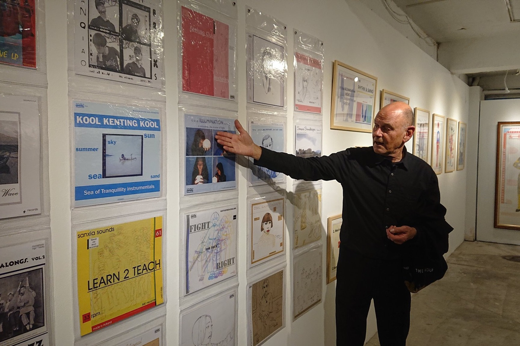 20190510 時空旅行 對話練習 特展座談會